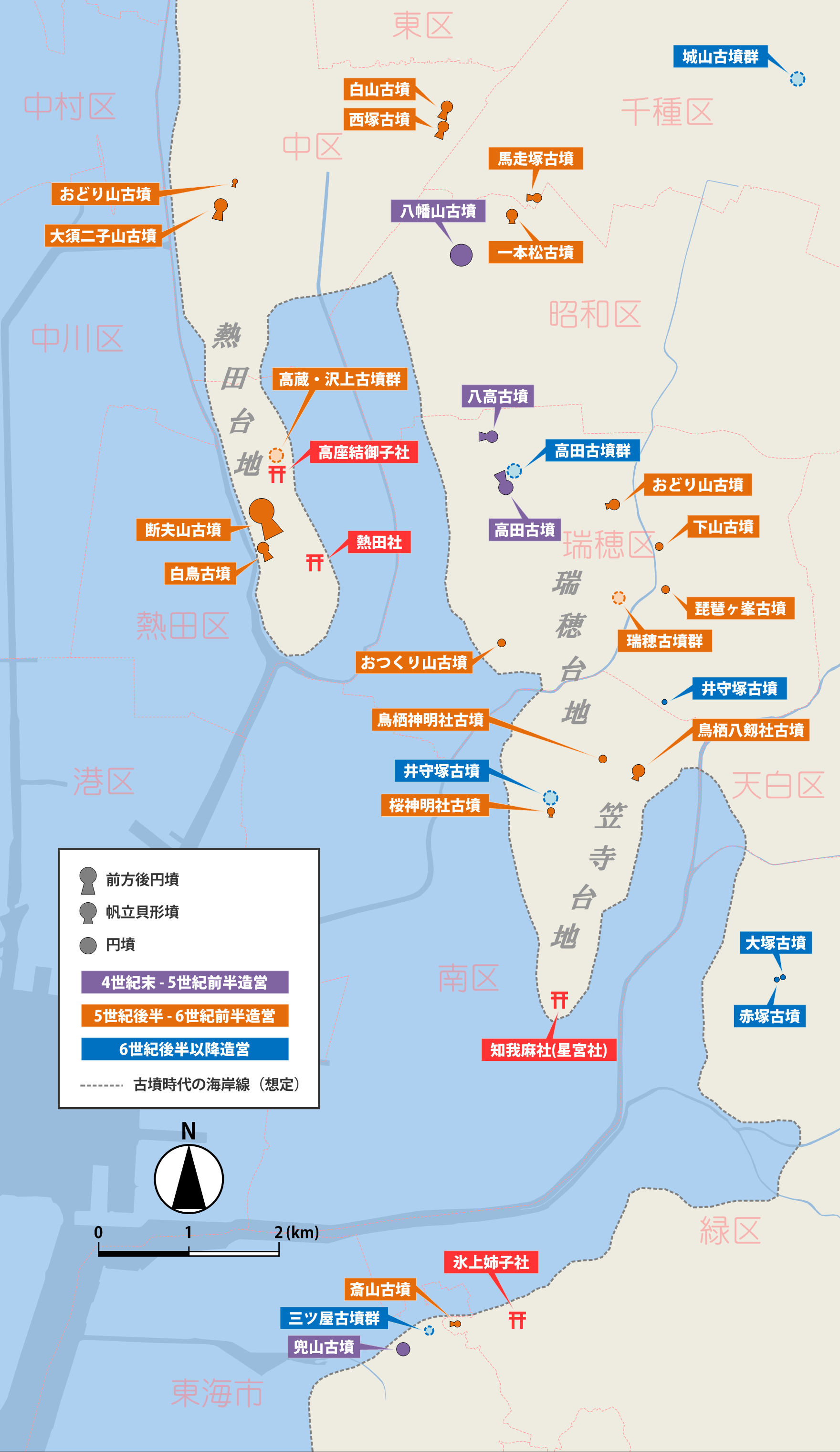 古墳時代における名古屋南部の古墳・神祠分布図（『新修名古屋市史第一巻』付図（P330・350・418・487）を元に作成）